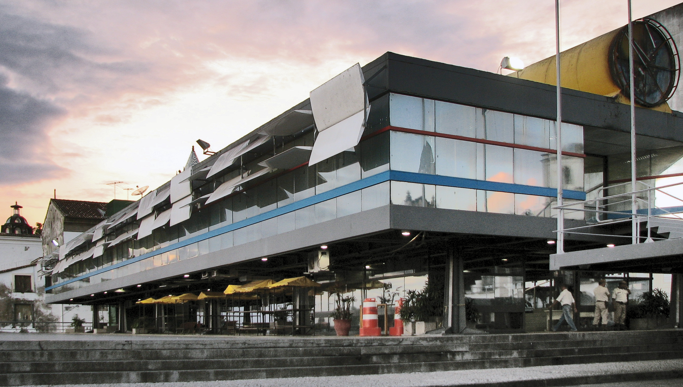 prefeitura de salvador arquiteto joão filgueiras lima - lelé maio de 2009